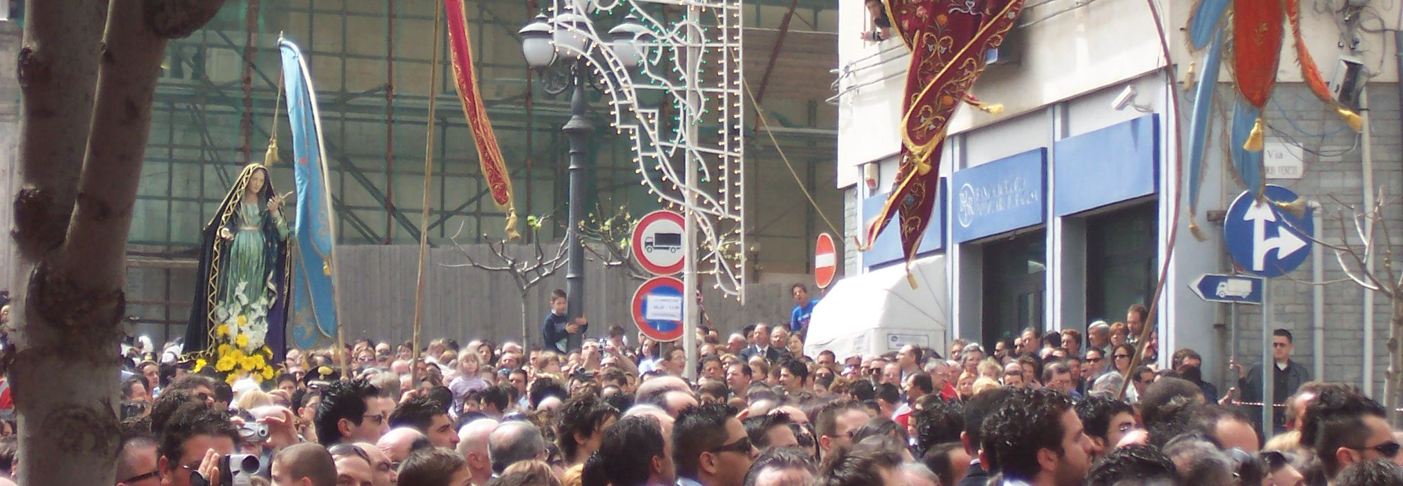 Licenza d'uso